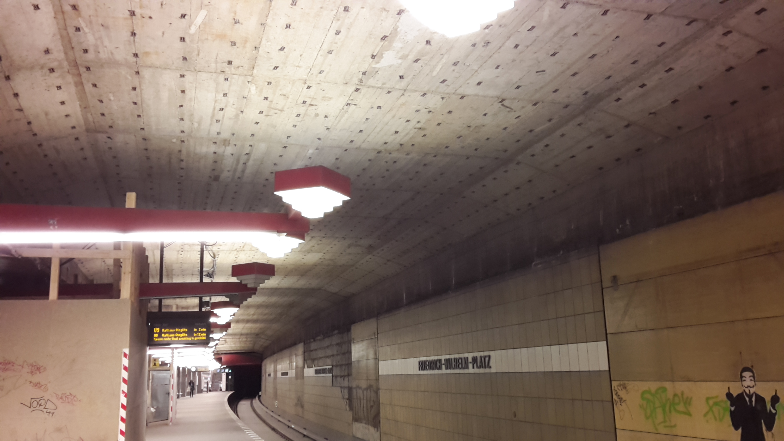 Linie U9 - Bahnsteig des Bahnhofs Friedrich-Wilhelm-Platz während des Bauzustandes am 8. April 2017